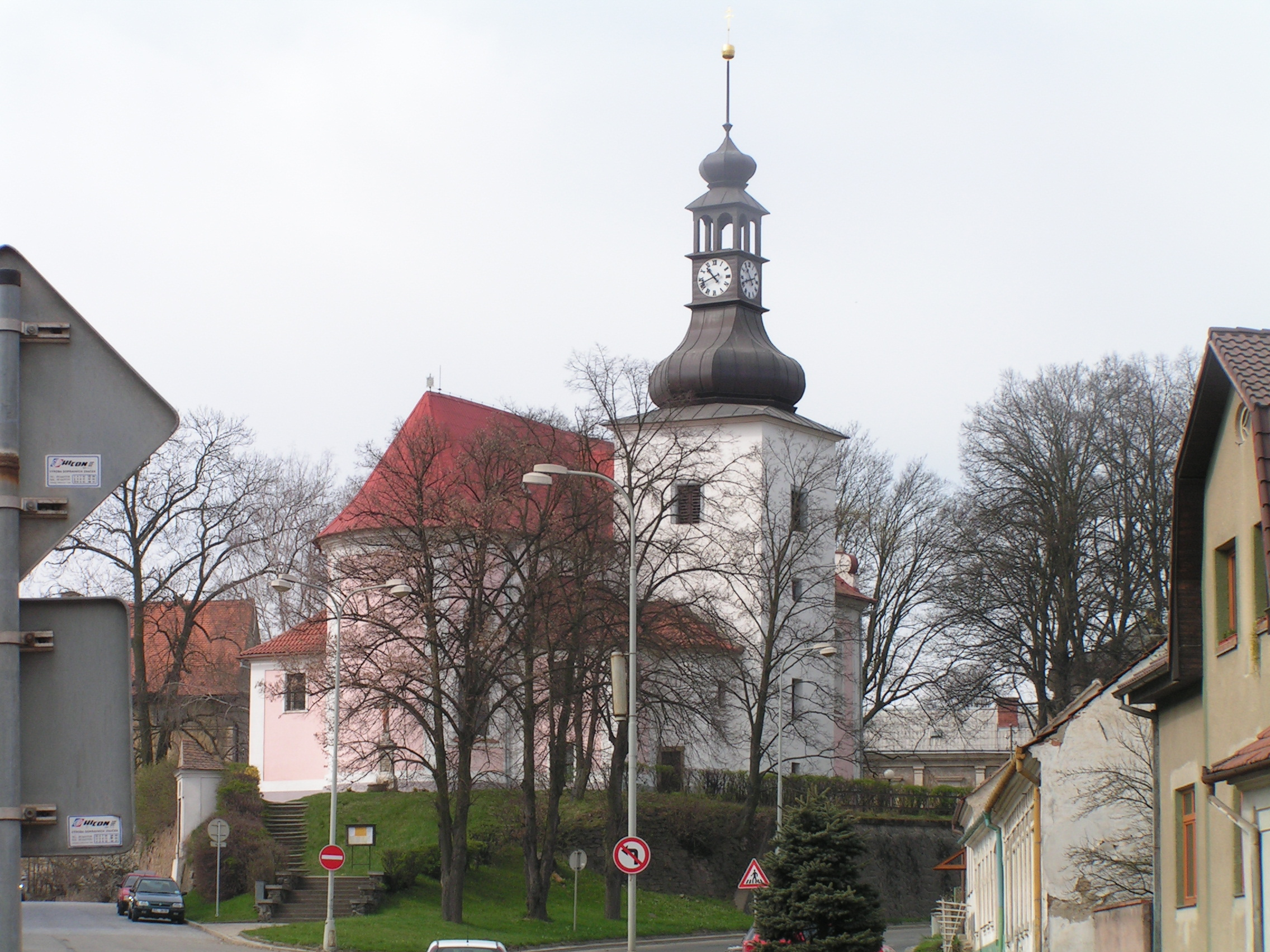 Kostel sv. Maří Magdaleny, Kuřim